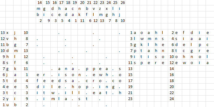 Изображение работы алгоритма на растровом листе.